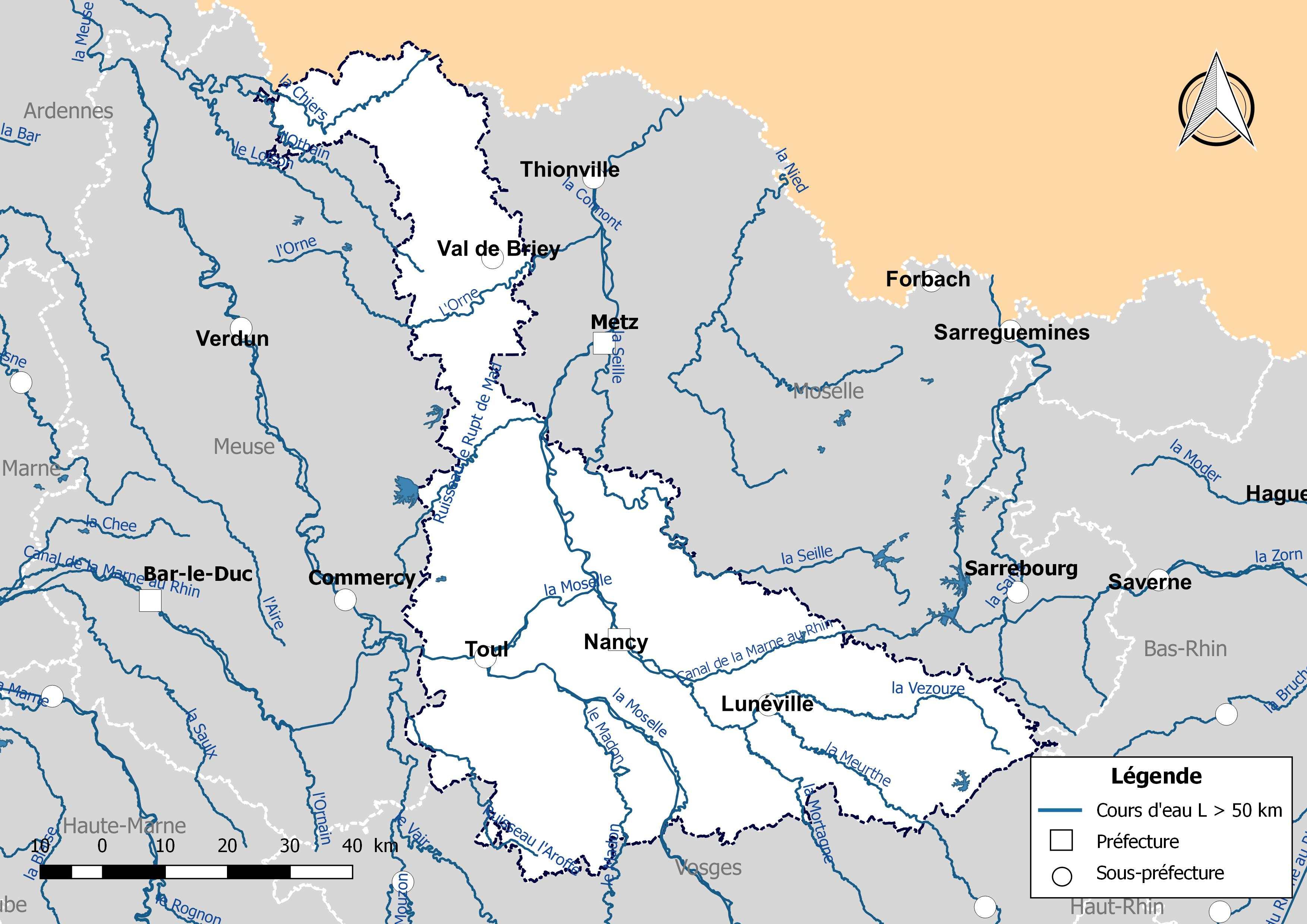 Carte des cours d'eau de longueur supérieure à 50 km drainant le département de Meurthe-et-Moselle (France).